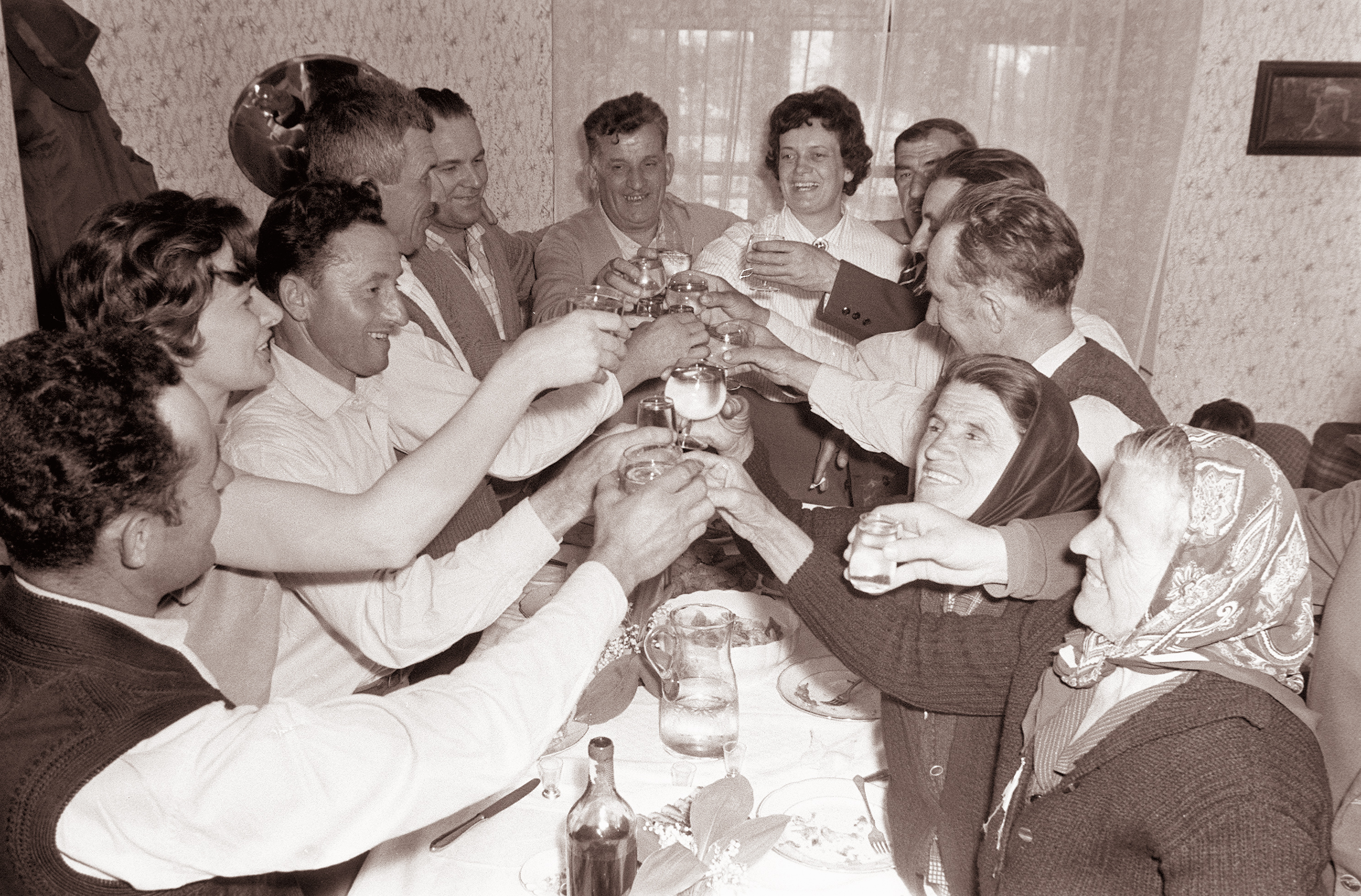 Vlak Bratstva in enotnosti v Mariboru